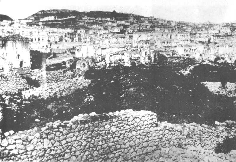 Шуши. Разрушенный квартал Джрабердцоц. В центре - Кусанац ванк.